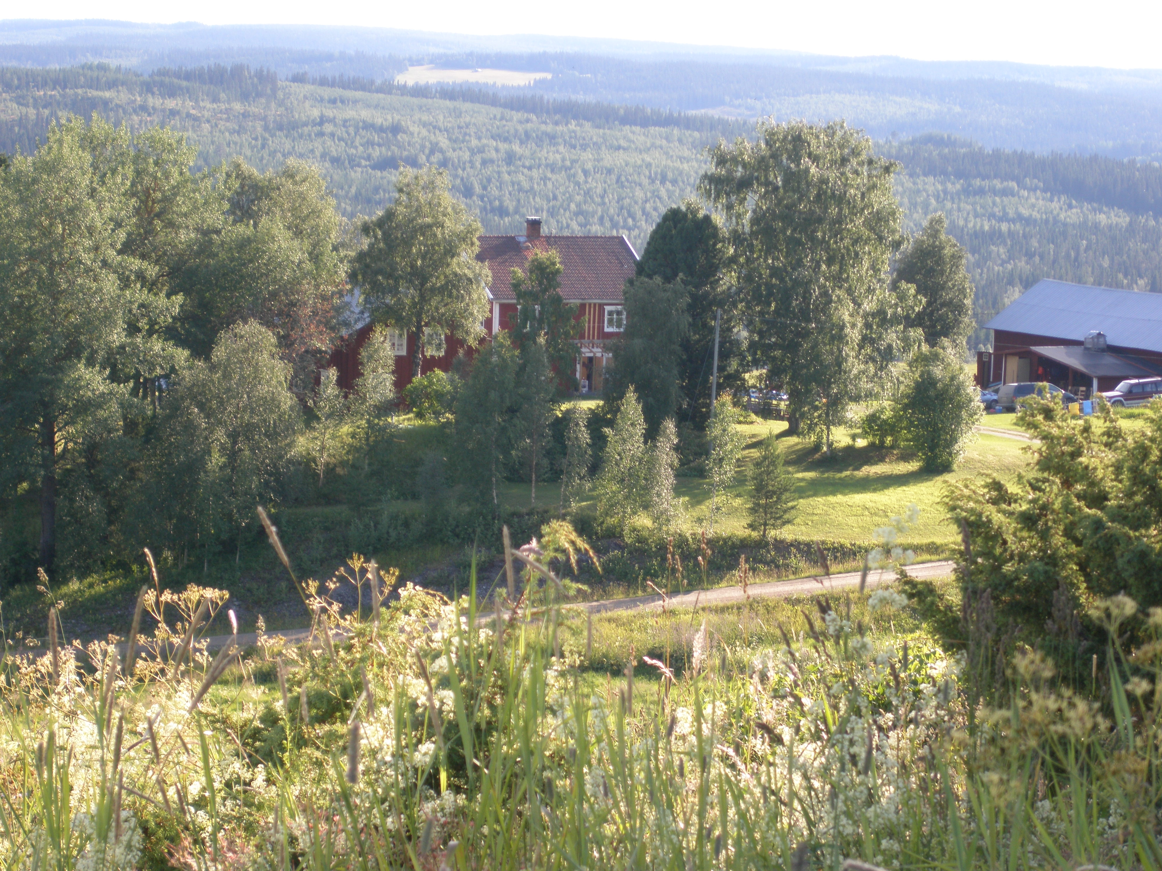 Bondgård i Önet, Offerdal, Krokoms kommun, Jämtland, Sverige.